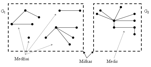 Palyginimas: medis ir miškas